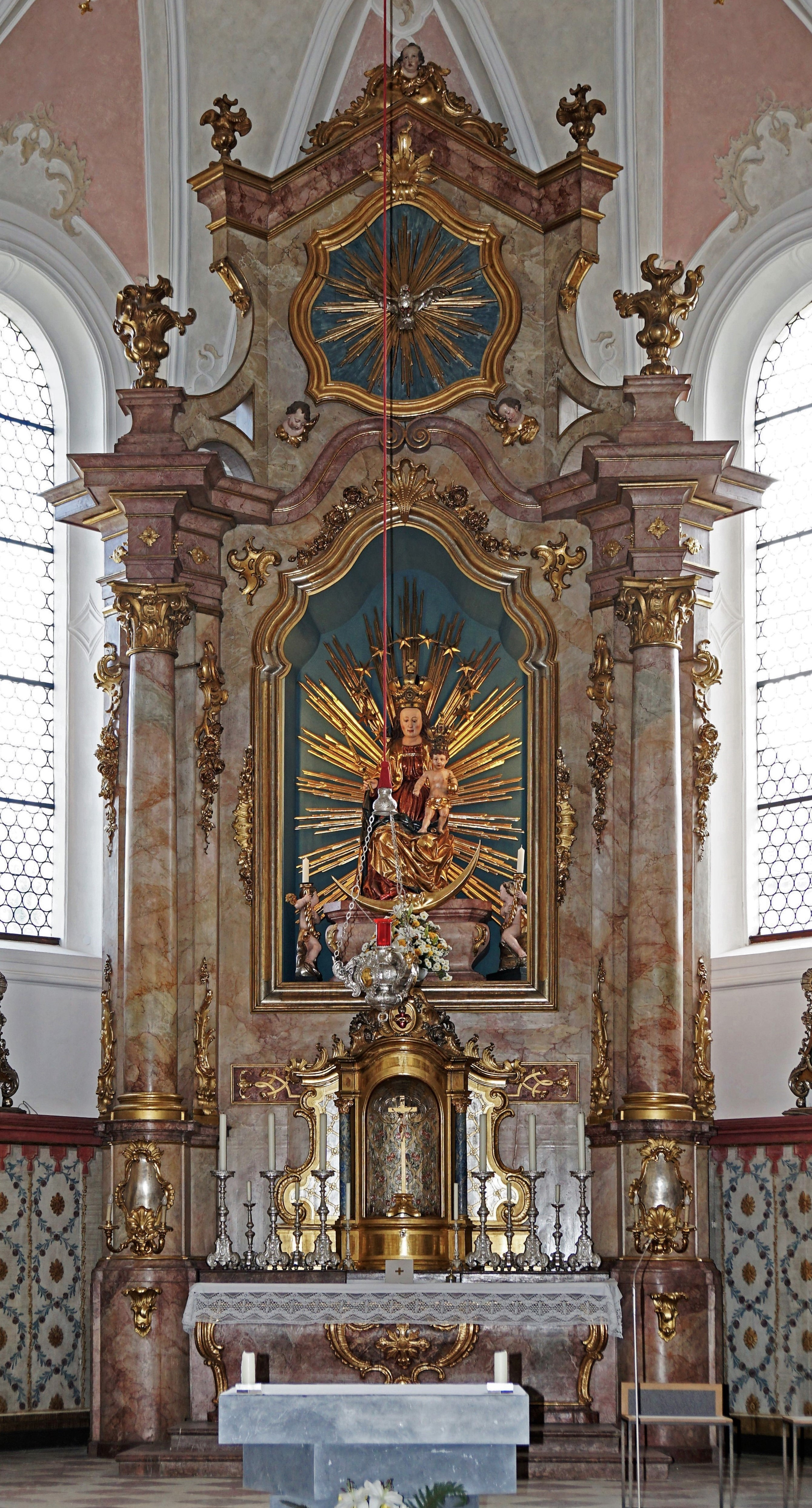 Pfarrkirche Mariä Himmelfahrt (Bad Aibling), barocker Hochaltar